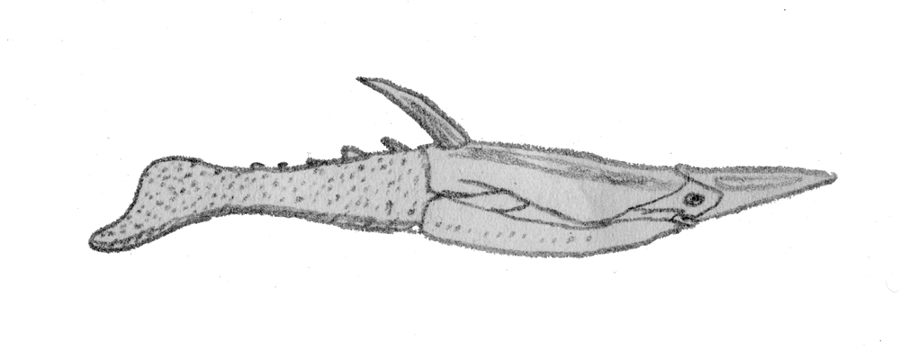 Pteraspis